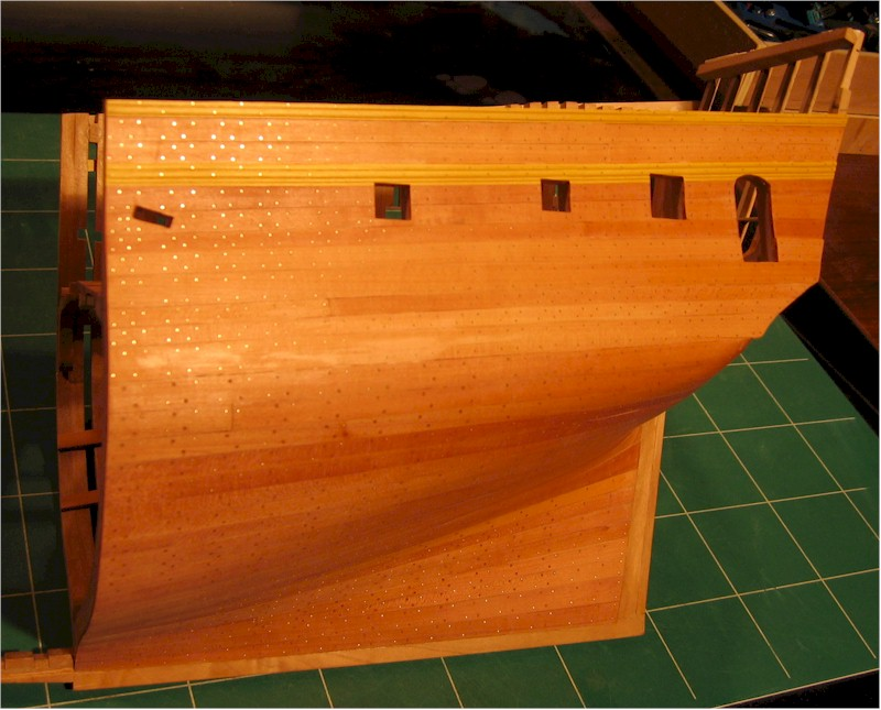 Tranche arrière de Modèle d'Arsenal